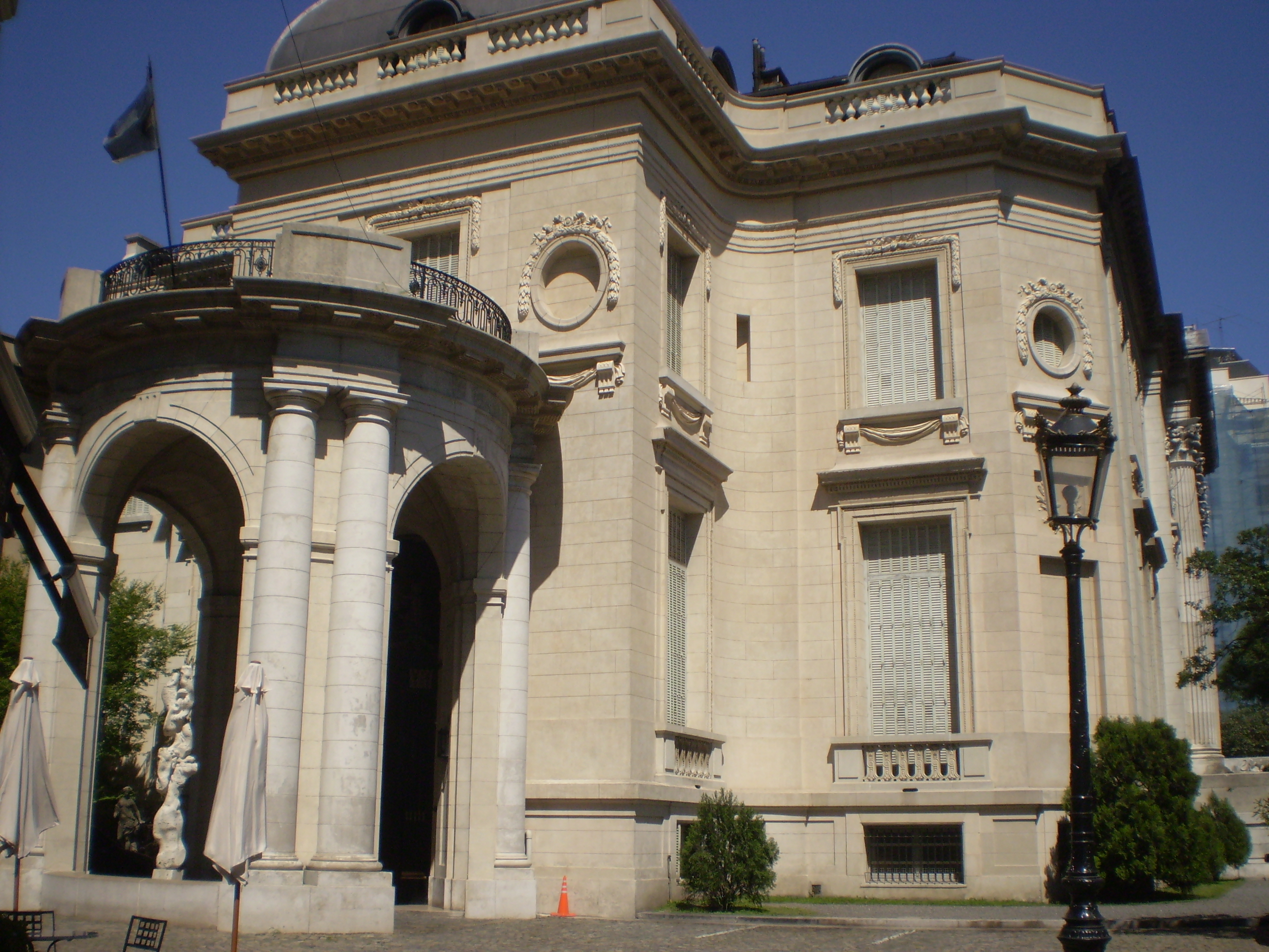 Museo Nacional de Arte Decorativo, Buenos Aires, Argentina